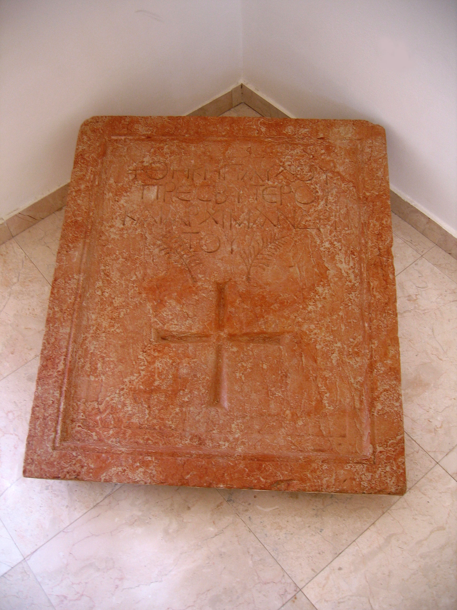 "קברו של פאולוס, כומר וראש המנזר" מצבה במרטיריון של מנזר מרטיריוס